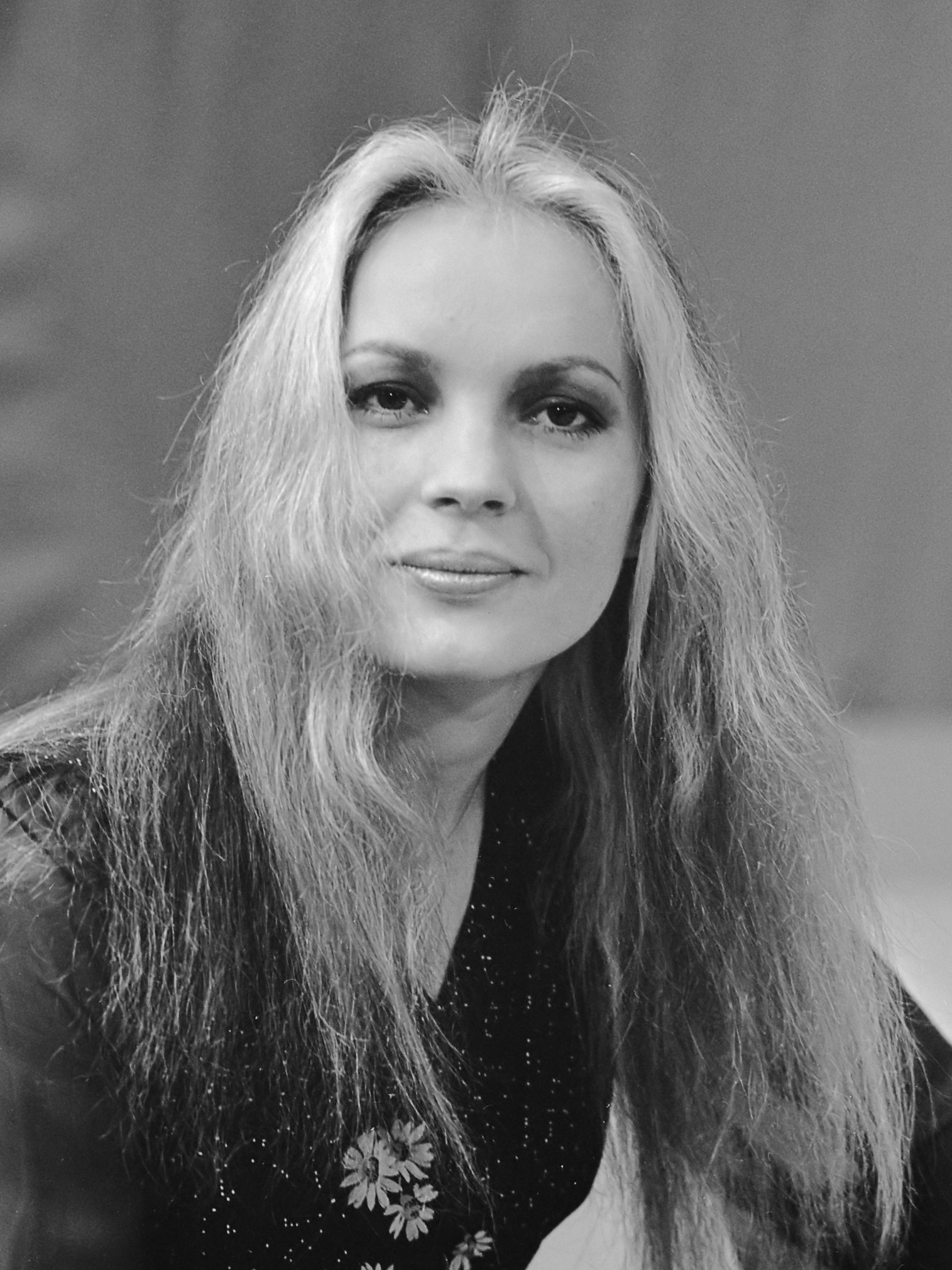 De Amerikaanse zangeres Chi Coltrane tijdens opnamen voor het AVRO televisieprogramma Toppop. Een portret van de zangeres 11 januari 1974